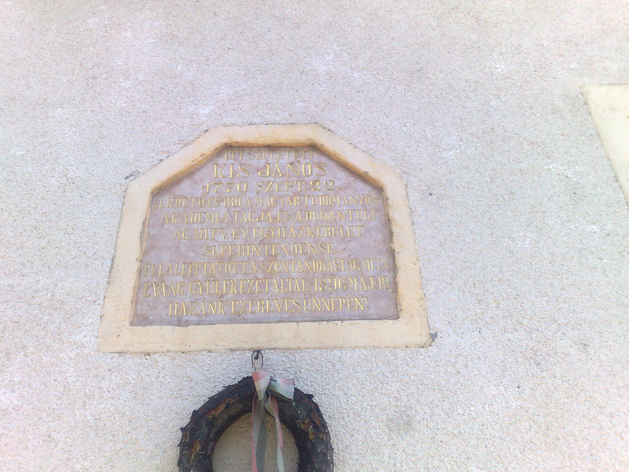 Emléktábla a Kis János szülőházának helyén épült házon (Rábaszentandrás)